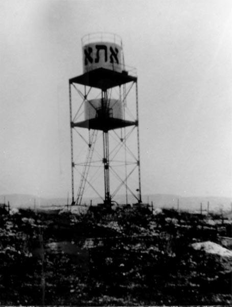 מגדל המים היה אחד המבנים הראשונים שהוקמו בפעל. הקונסטרוקציה הוזמנה במפעל \"שקודה\" בצ\'כיה. \"המרפסת\", סביב המיכל בקומה העליונה, תוכננה מלכתחילה כעמדת שמירה.